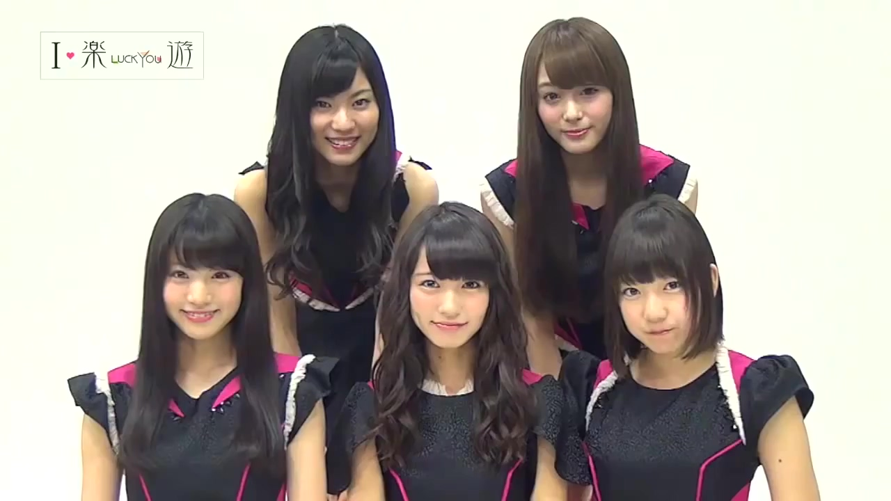 楽遊 vol.44号表紙【夢みるアドレセンス】さんからのコメント！